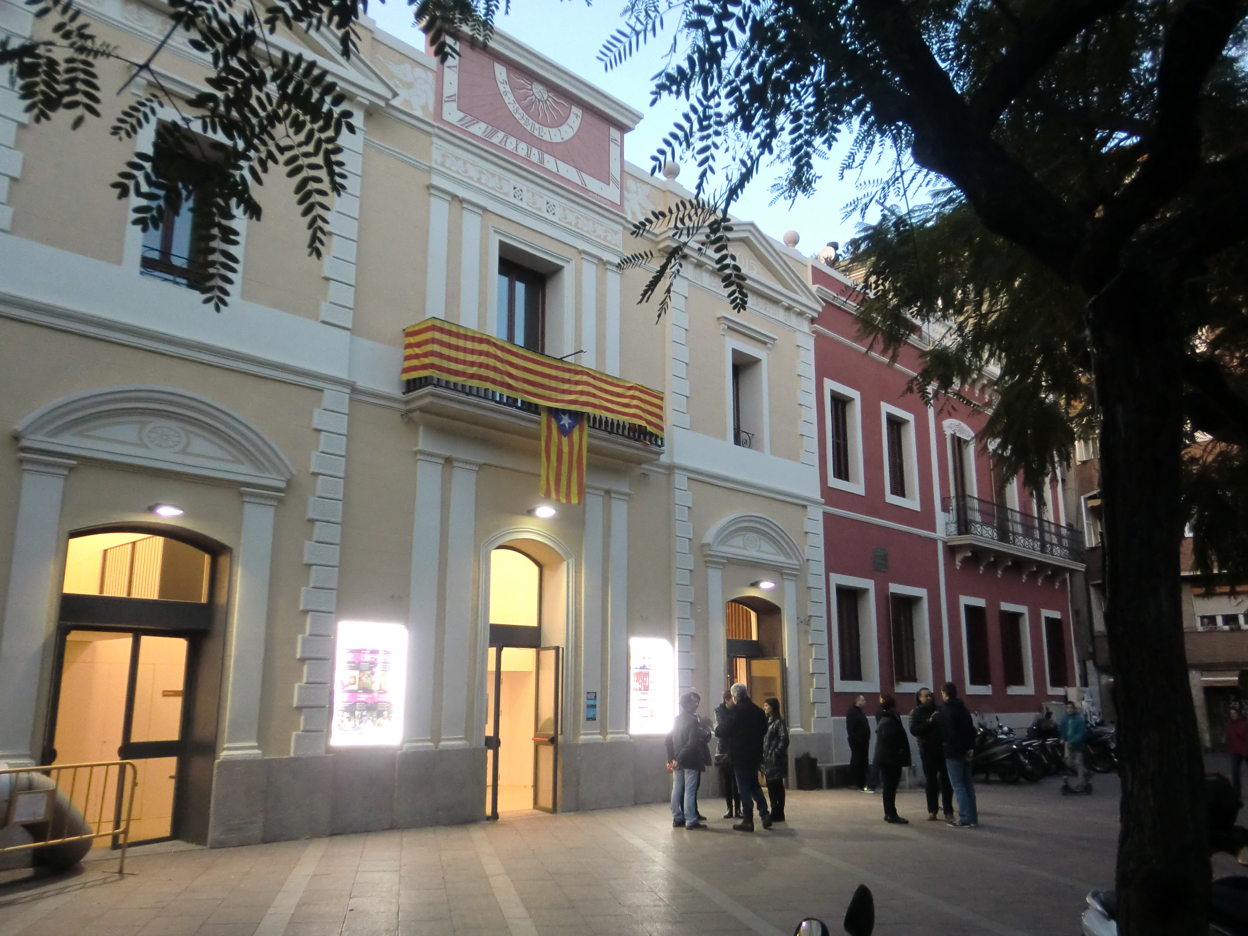 Seu dels Lluïsos de Gràcia. Plaça del Nord, Barcelona. 10 de gener de 2016